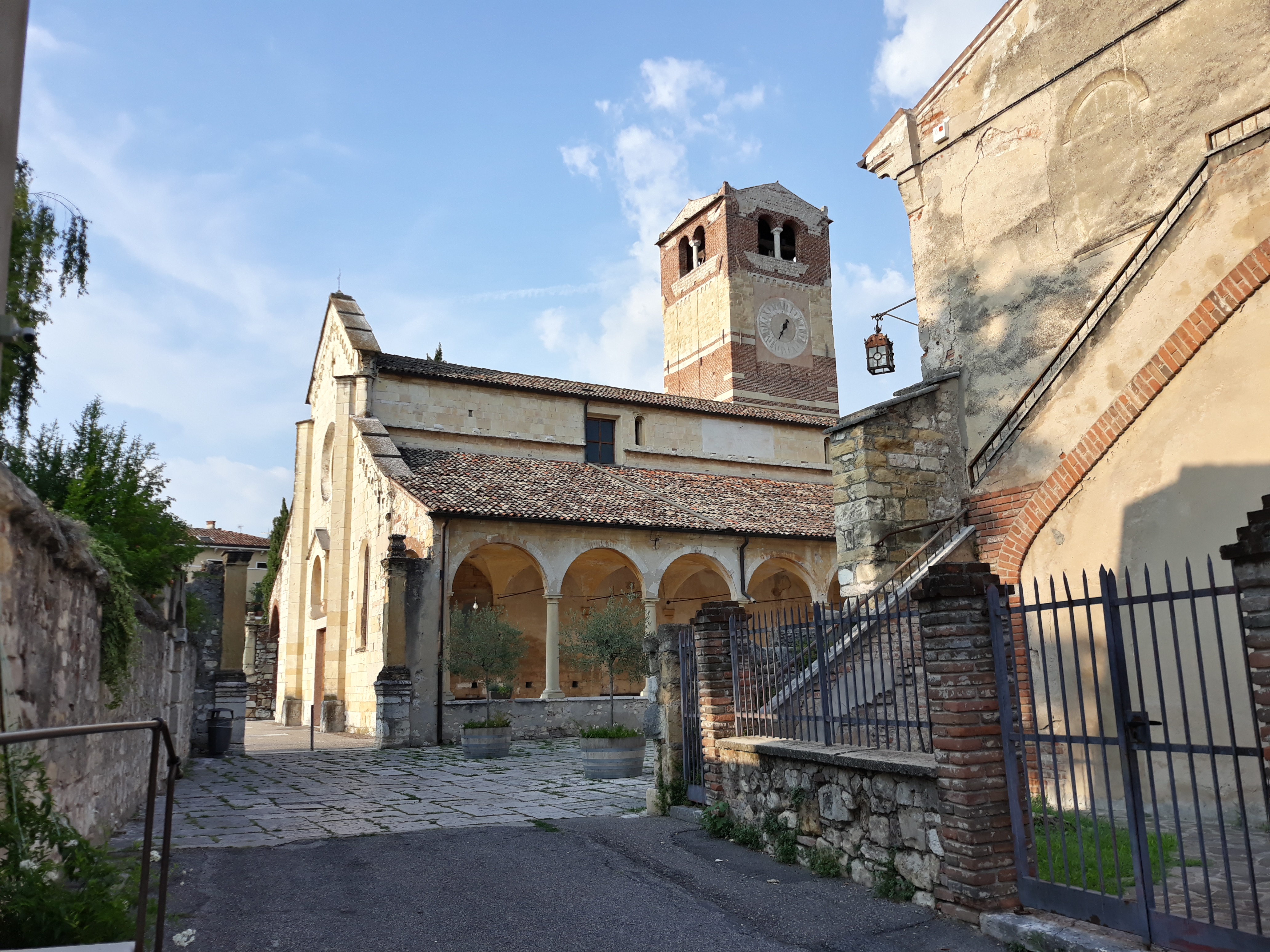 Esterno della Pieve di San Floriano a San Pietro in Cariano